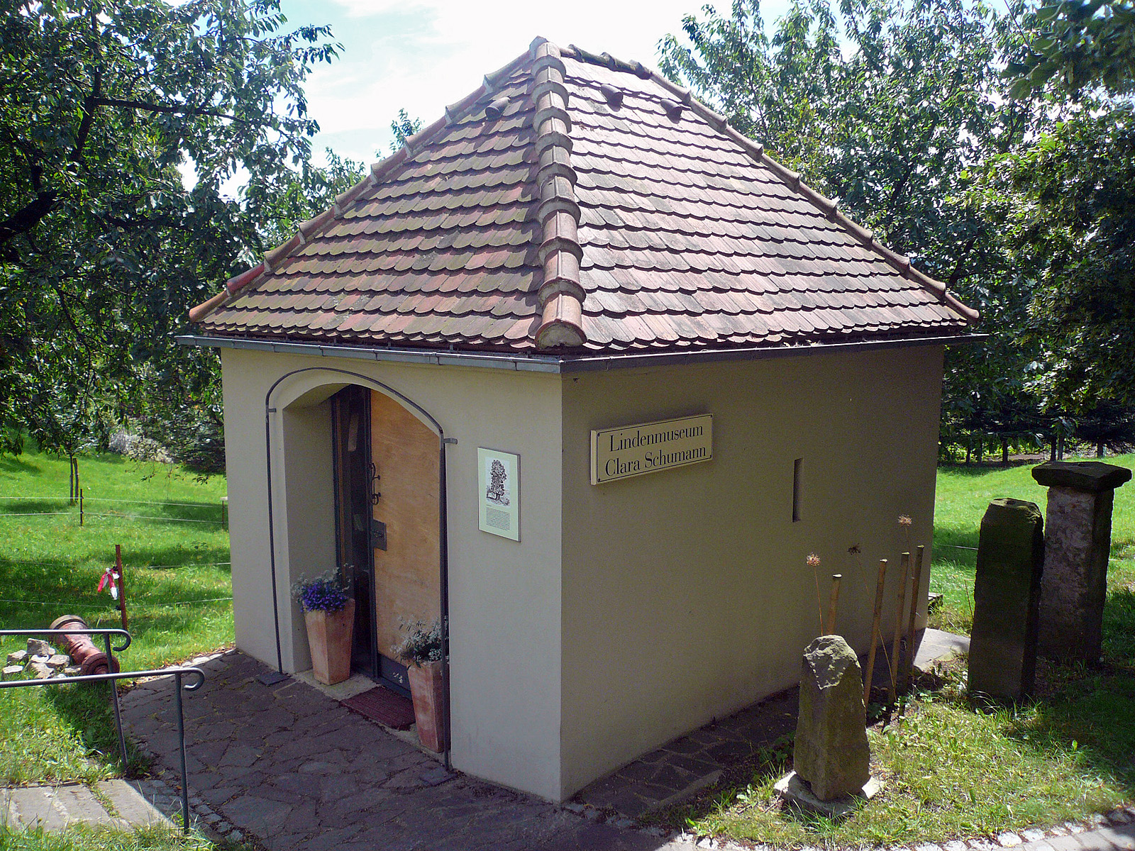 Schmorsdorfer Linde, Lindenmuseum